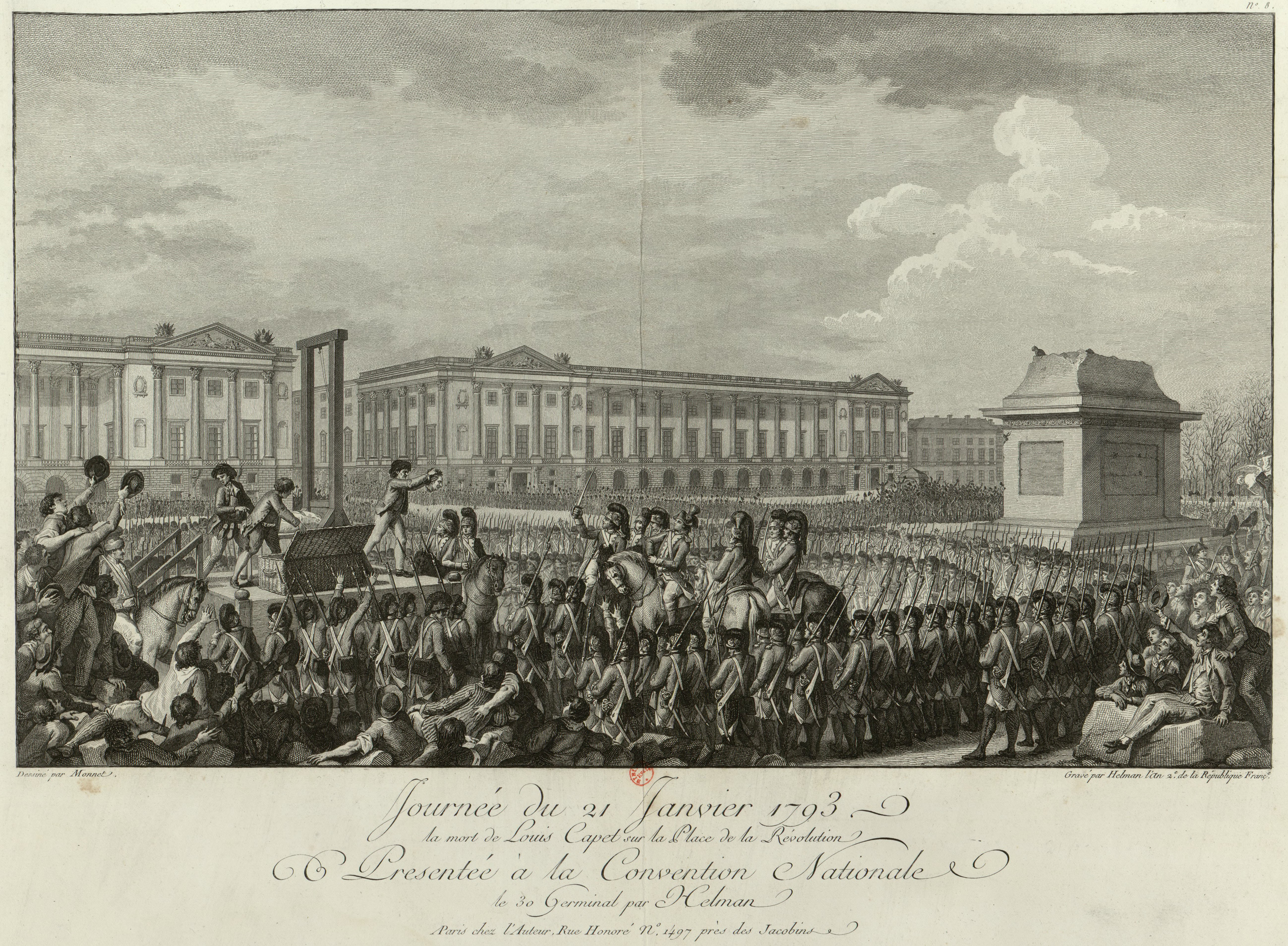 Journée du 21 janvier 1793 la mort de Louis Capet sur la place de la Révolution : présentée à la Convention nationale le 30 germinal par Helman